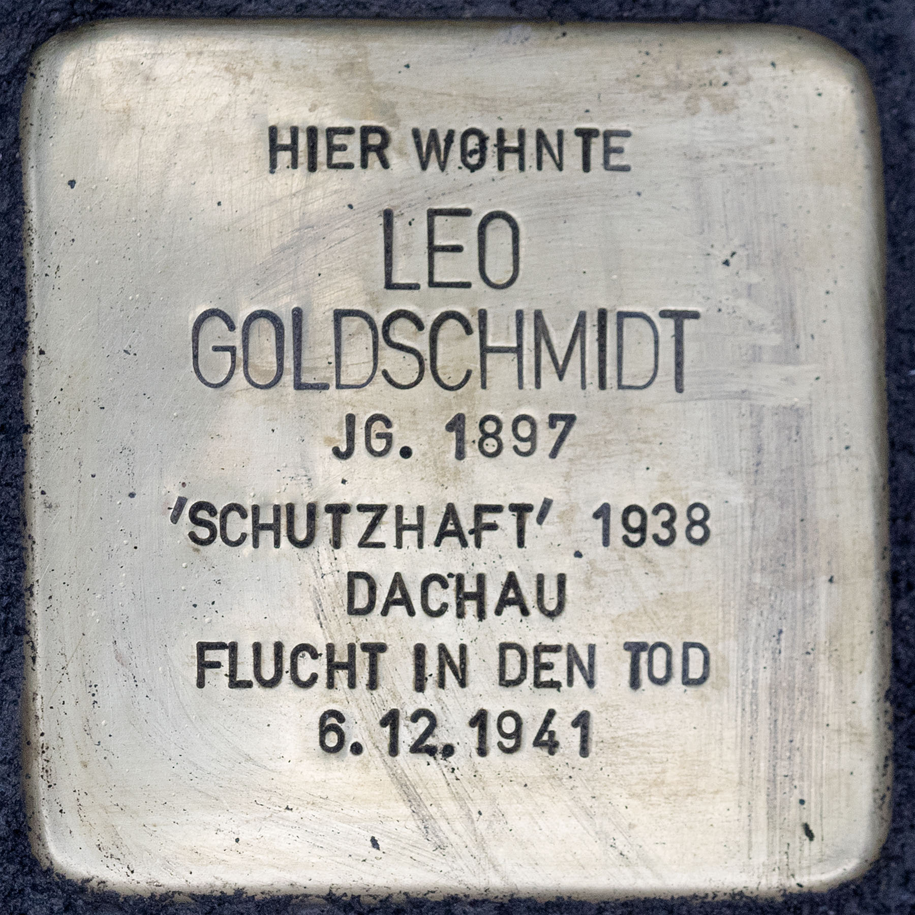 Stolpersteine Kempen: Leo Goldschmidt